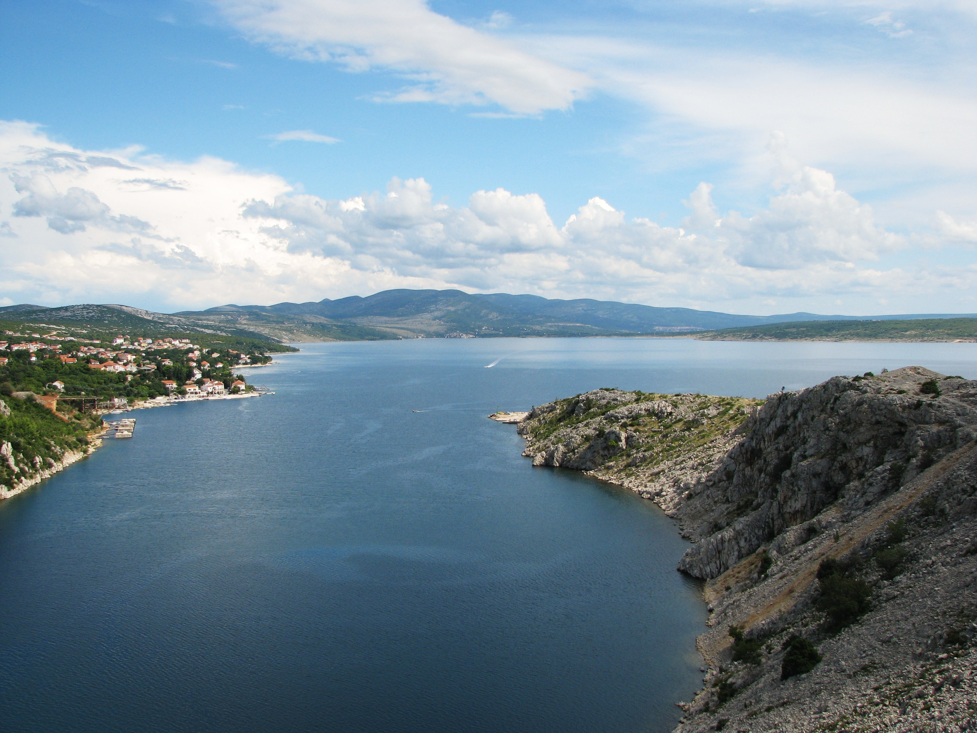 Novigradsko more i ulaz u Novsko ždrilo (pogled s Masleničkog mosta)